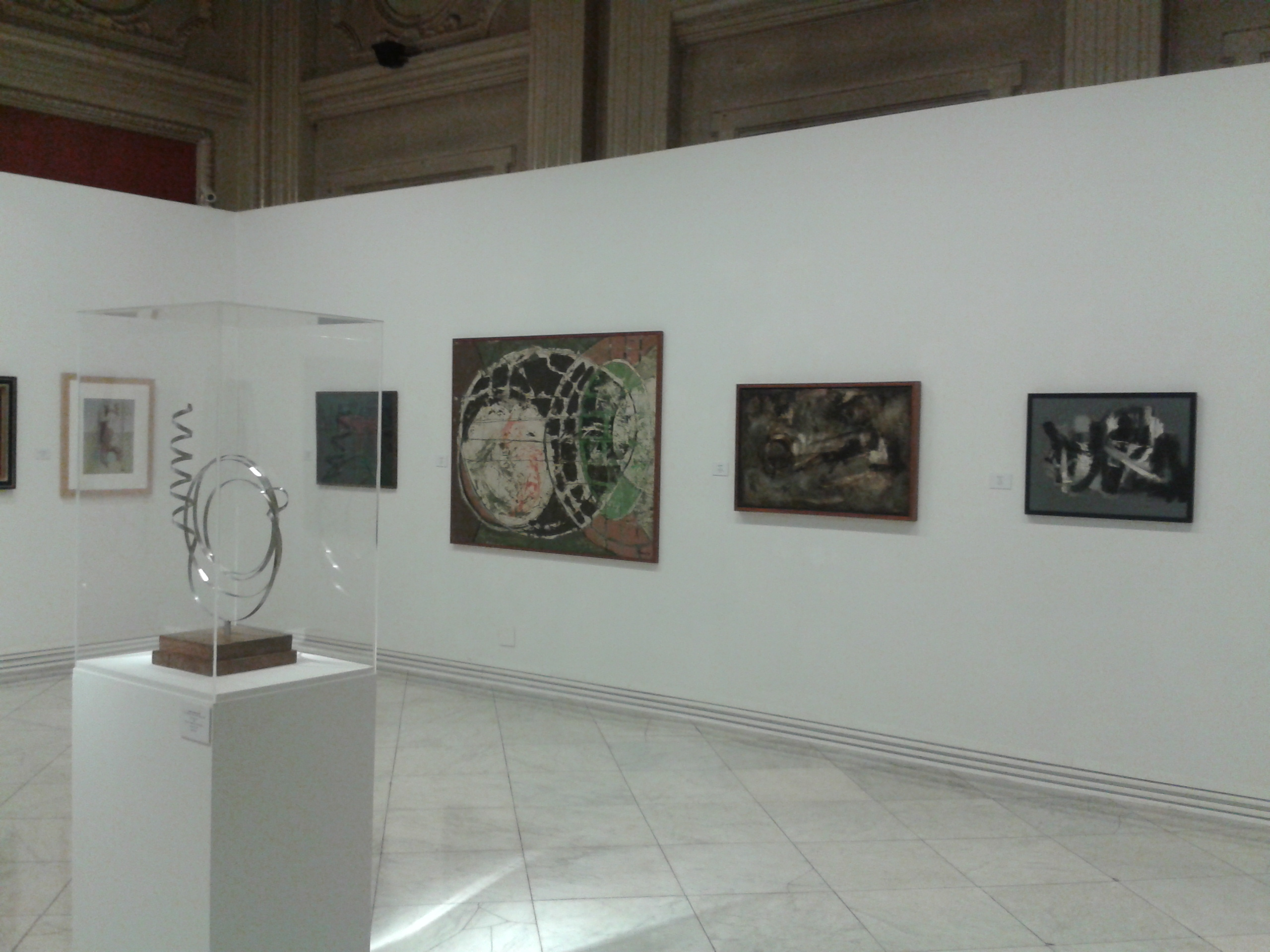 En primer terme, "De l'aire a l'aire", de Leandre Cristòfol. Al darrere, "Òvals", de Lluís Trepat